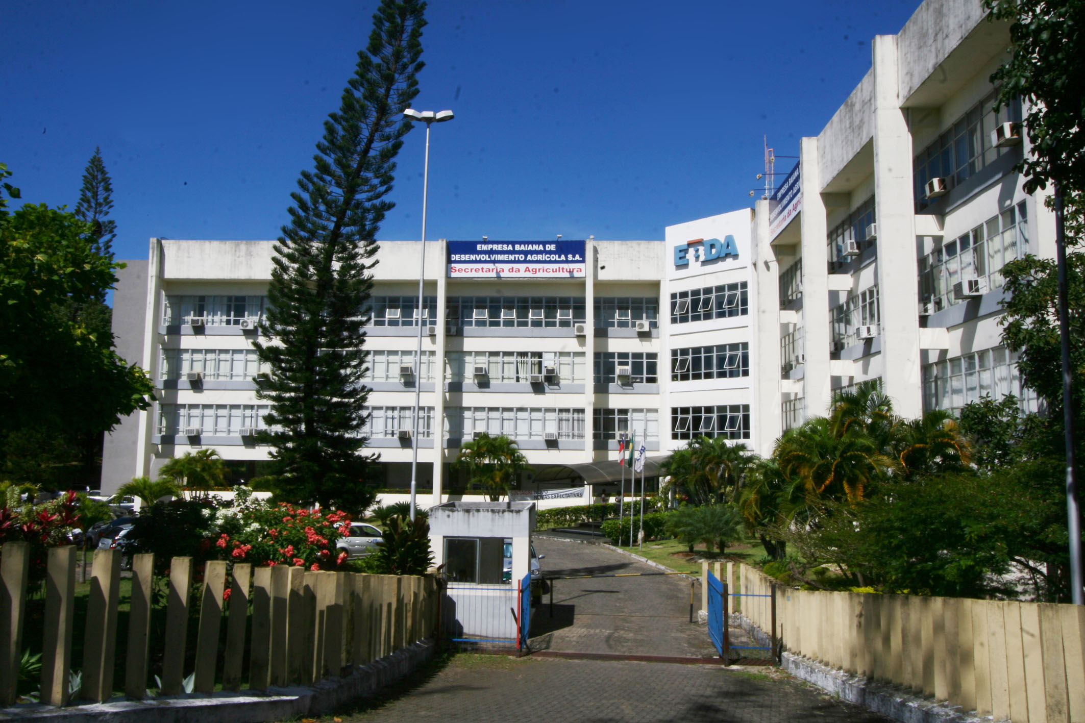 Produtos da agricultura familiar chegam até a merenda das escolas estaduais Na foto: Saída dos produtos da agricultura familiar da EBDA - Empresa Baiana de Desenvolvimento Agrícola Foto: Carol Garcia / SECOM